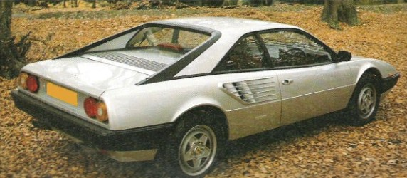 Bildbeschreibung: Ferrari Mondial 8 Heck, aufgenommen in Swansea, Wales Quelle:A.Wart (Benutzer; Enthusiast, eigenes Foto) Fotograf:A.Wart Datum:23.06.1997 Sonstiges:JPEG-Bild, Abmessungen; 572 x 250, 54kb Lizenz:Ich stimme der Public-Domain Lizenz zu und veröffentliche das Bild.